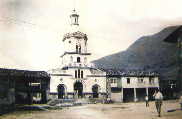 Plaza central de Huertas 1960